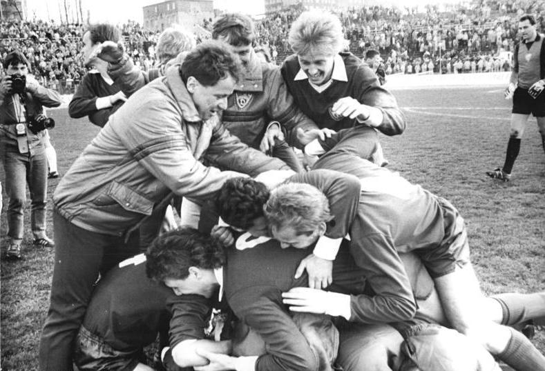 ADN-ZB-Oberst-1.4.89-fd-Berlin: BFC-Dynamo gewann FDGB-Pokal- Zum drittenmal in der Klubgeschichte gewann die Berliner Auswahl den FDGB-Pokal im Fußball. Vor 38.000 Zuschauern im Stadion der Weltjugend bezwang der Cupverteidiger den FC Karl-Marx-Stadt mit 1:0 (0:0). Nach dem Schlußpfiff gingen Trainer Jürgen Bogs (Mitte) und seine Mannen vor Freude zu Boden.